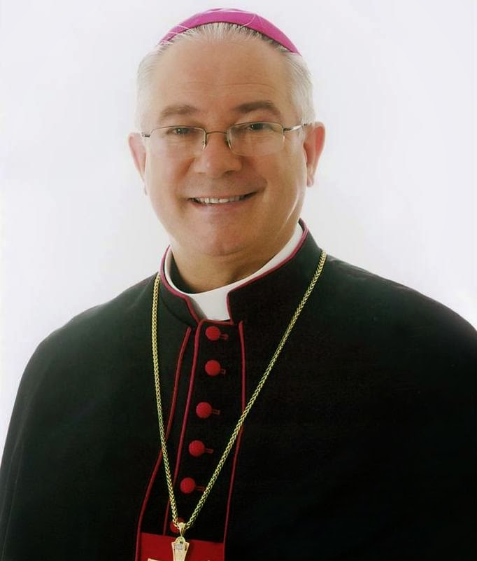 dom celso